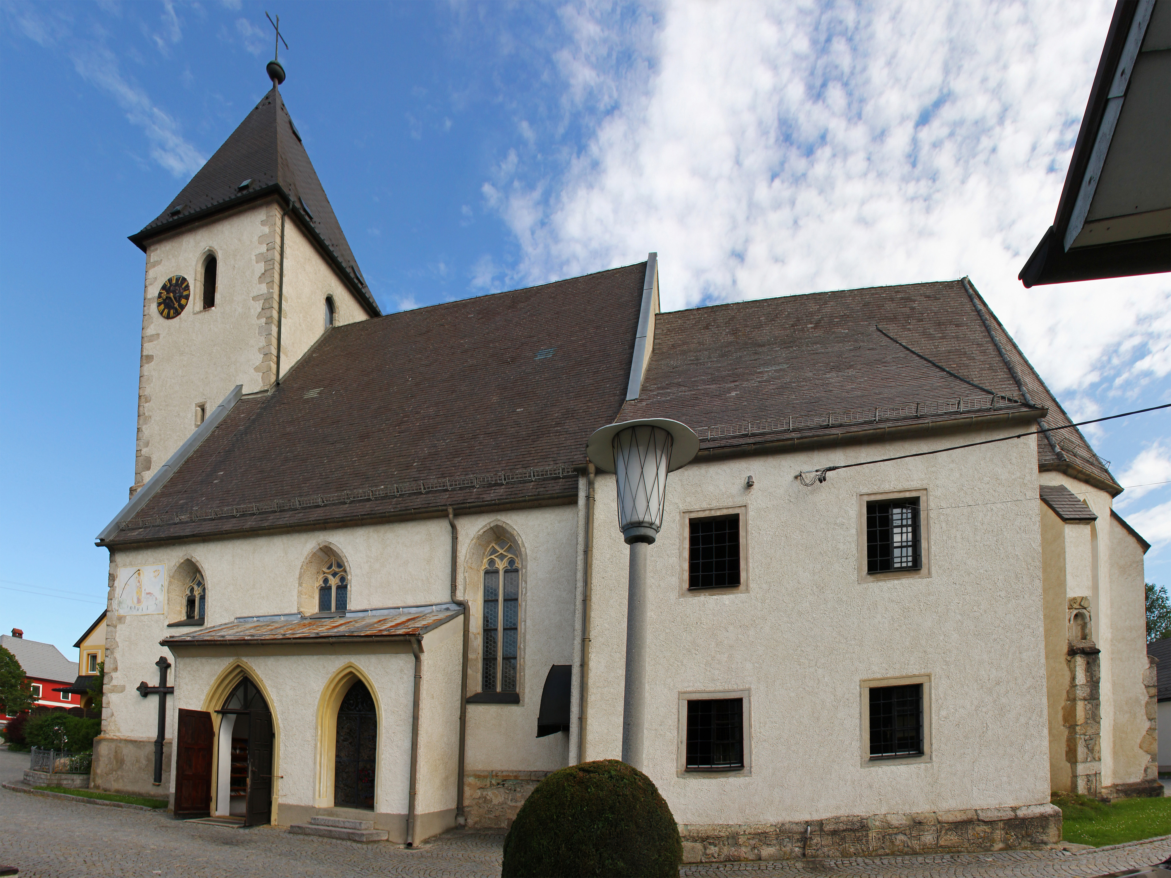 Die Wallfahrtskirche "Maria am grünen Anger" ist ein dreischiffiger, spätgotischer Bau.